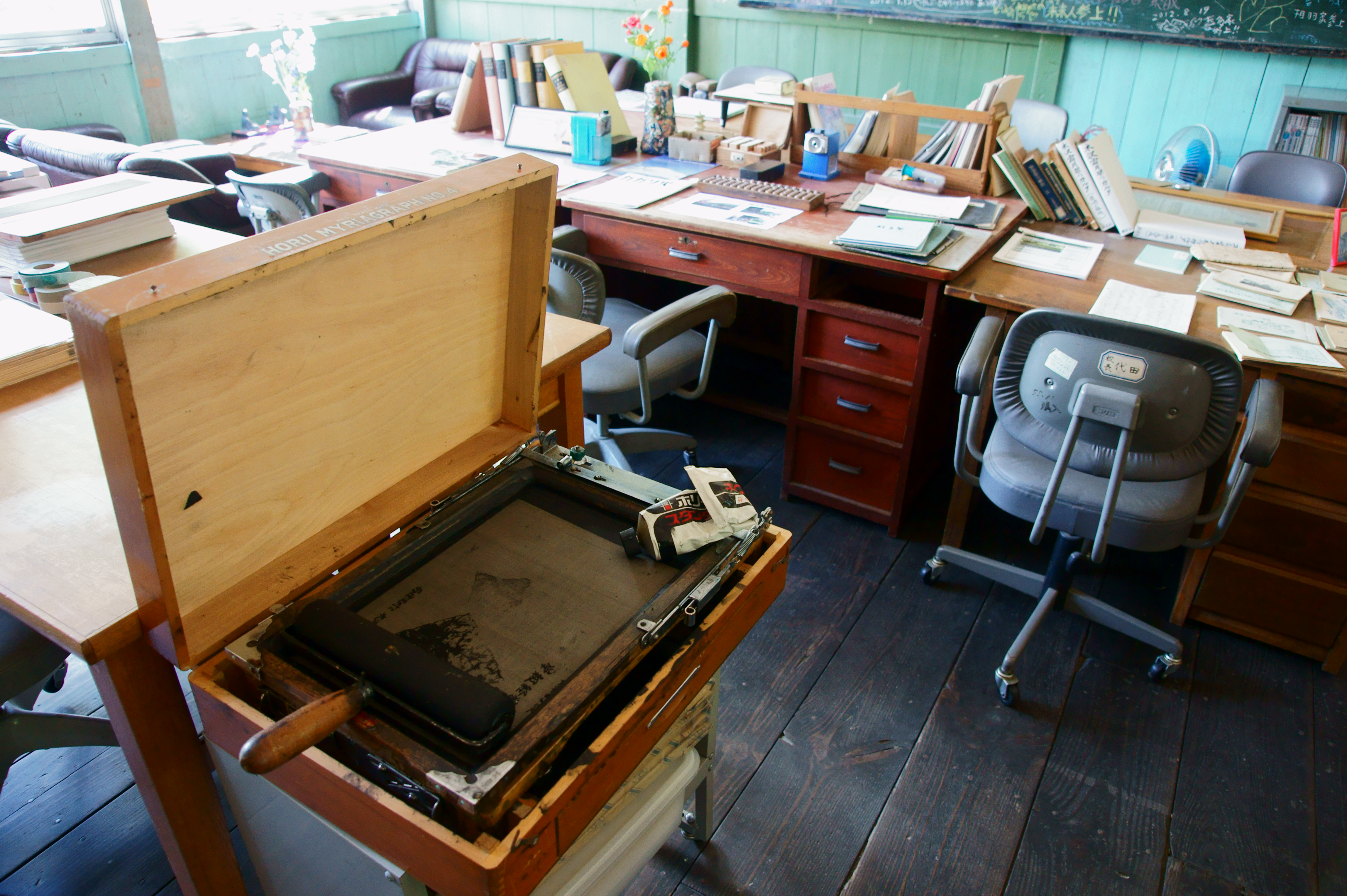 謄写版 (ガリ版) HORII MYRIAGRAPH №4 [1]